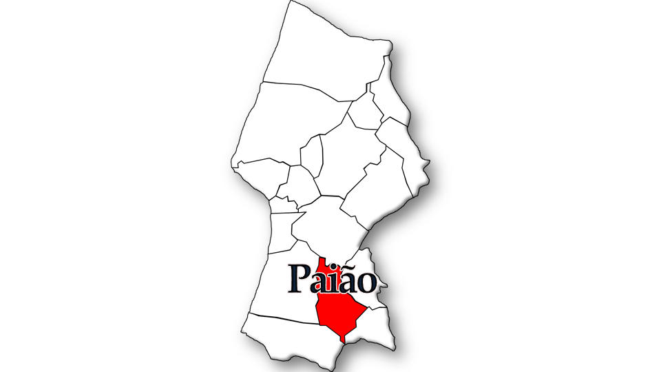 População